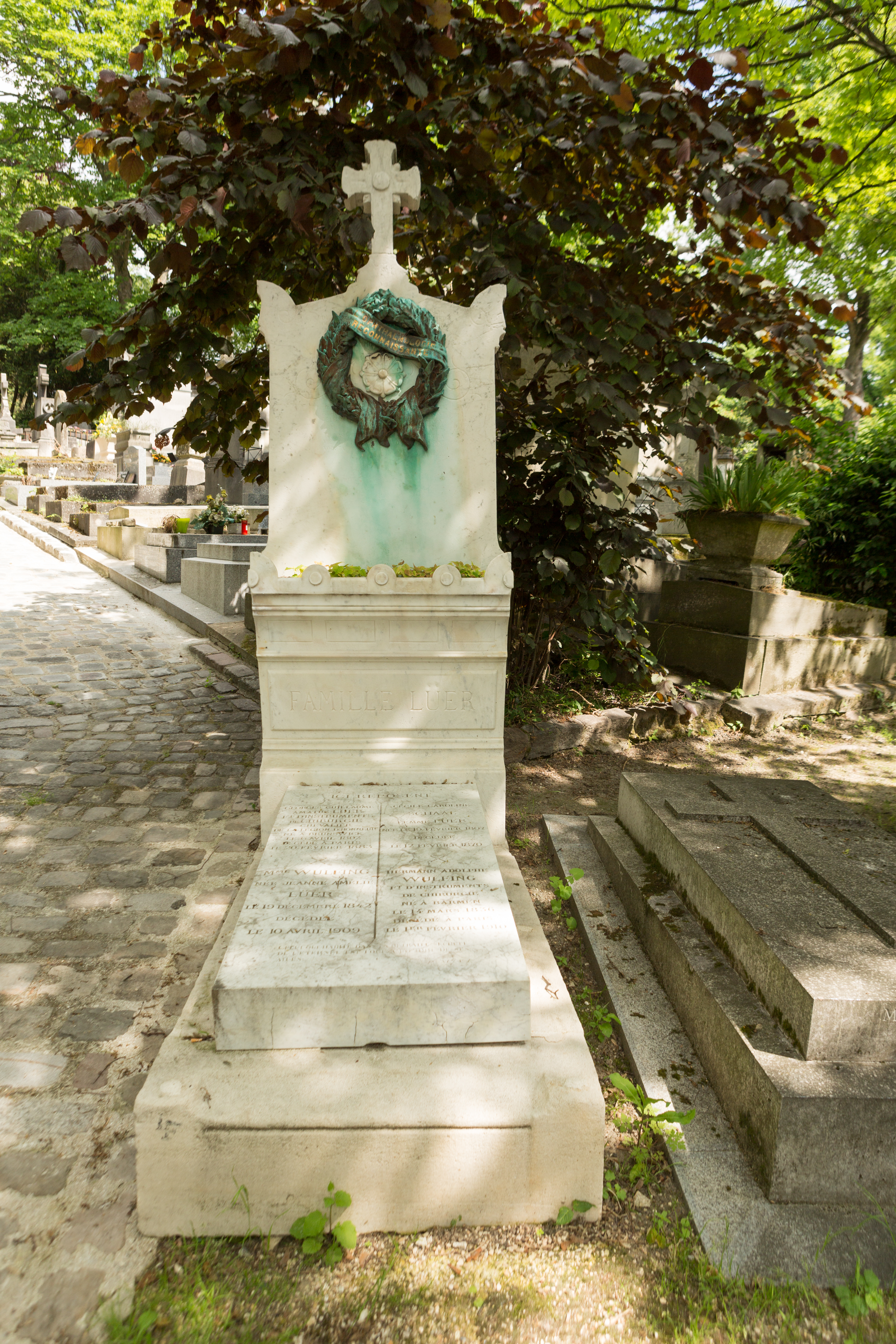 Sépulture de Georges-Guillaume-Amatus Lüer (1802-1883), célèbre fabricant d'instruments de chirurgie à la tête de la maison Lüer, grande maison de coutellerie médicale parisienne.